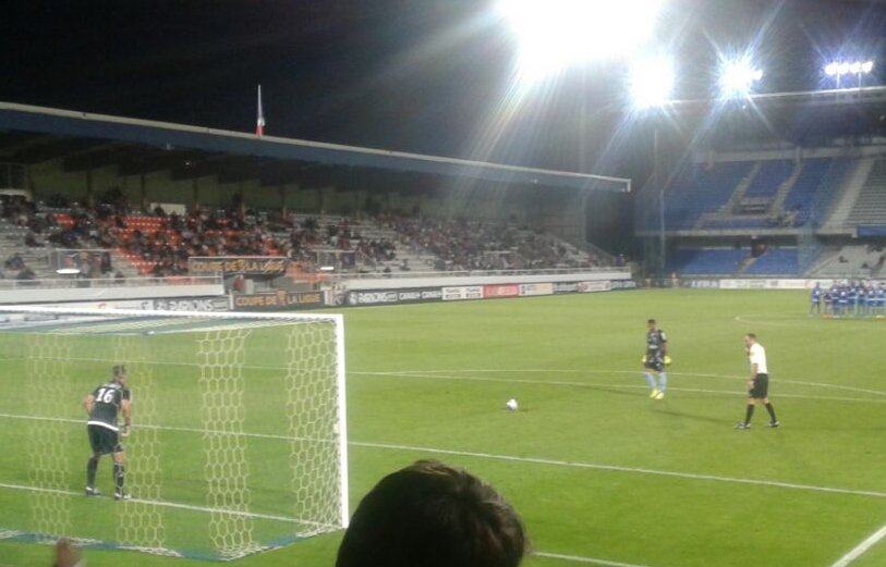 Zacharie Boucher, gardien auxerrois, est le 5e tireur de la séance de tir au but du match du 1er tour de la Coupe de la Ligue AJ Auxerre - FBBP 01 lors de la saison 2016-2017.